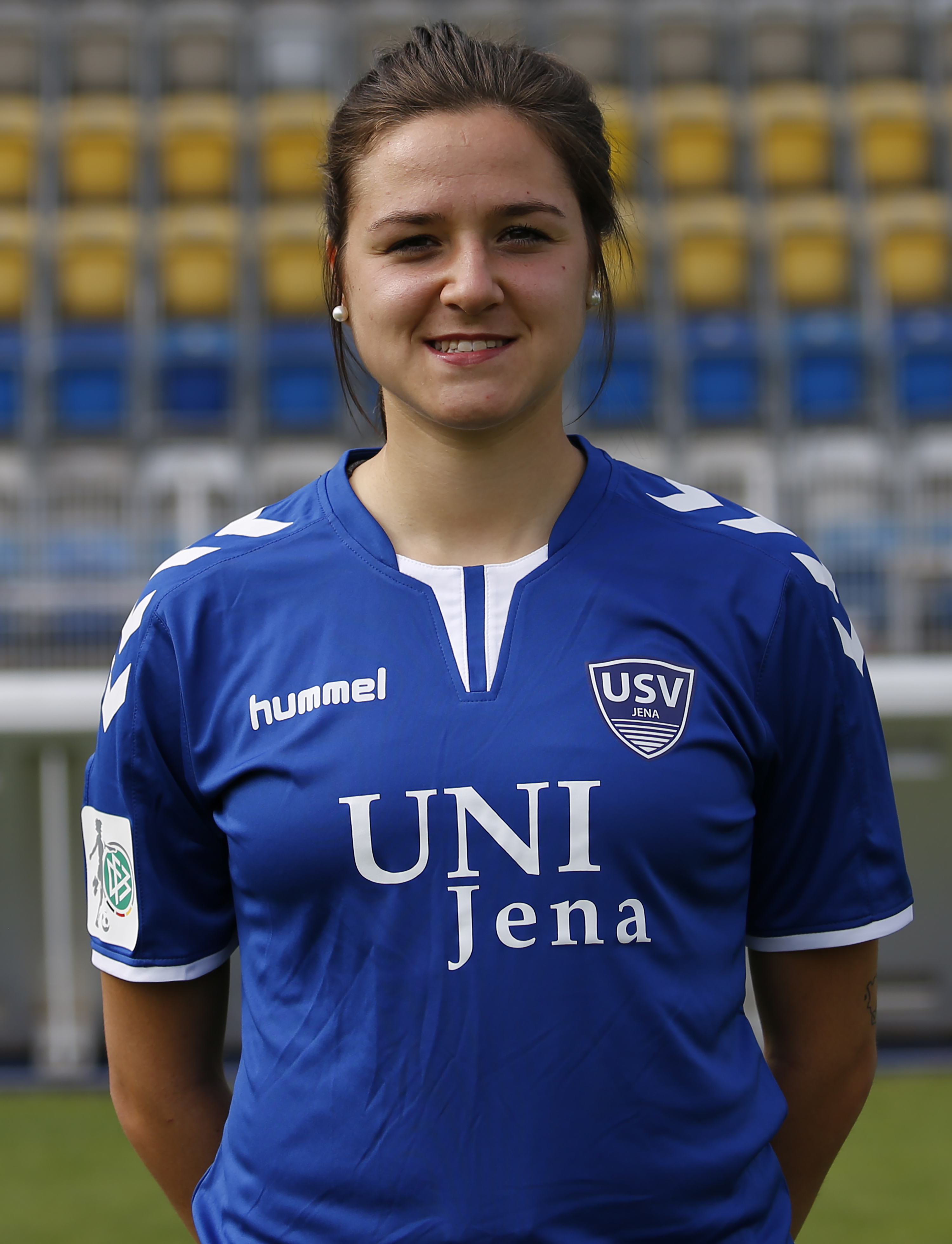 Luisa Lagaris FF USV Jena II/ 2017